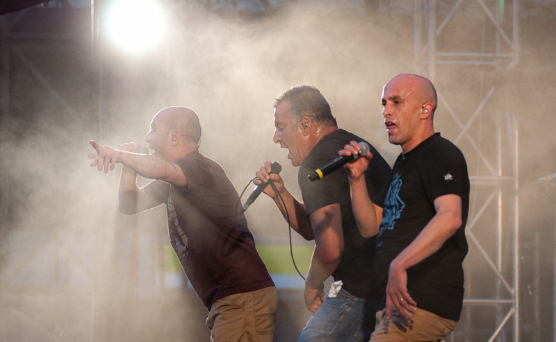 Mouss, Hakim et Magyd du groupe Zebda au concert du 14 juillet 2012 sur les Allées Jean Jaurès à Toulouse (France).